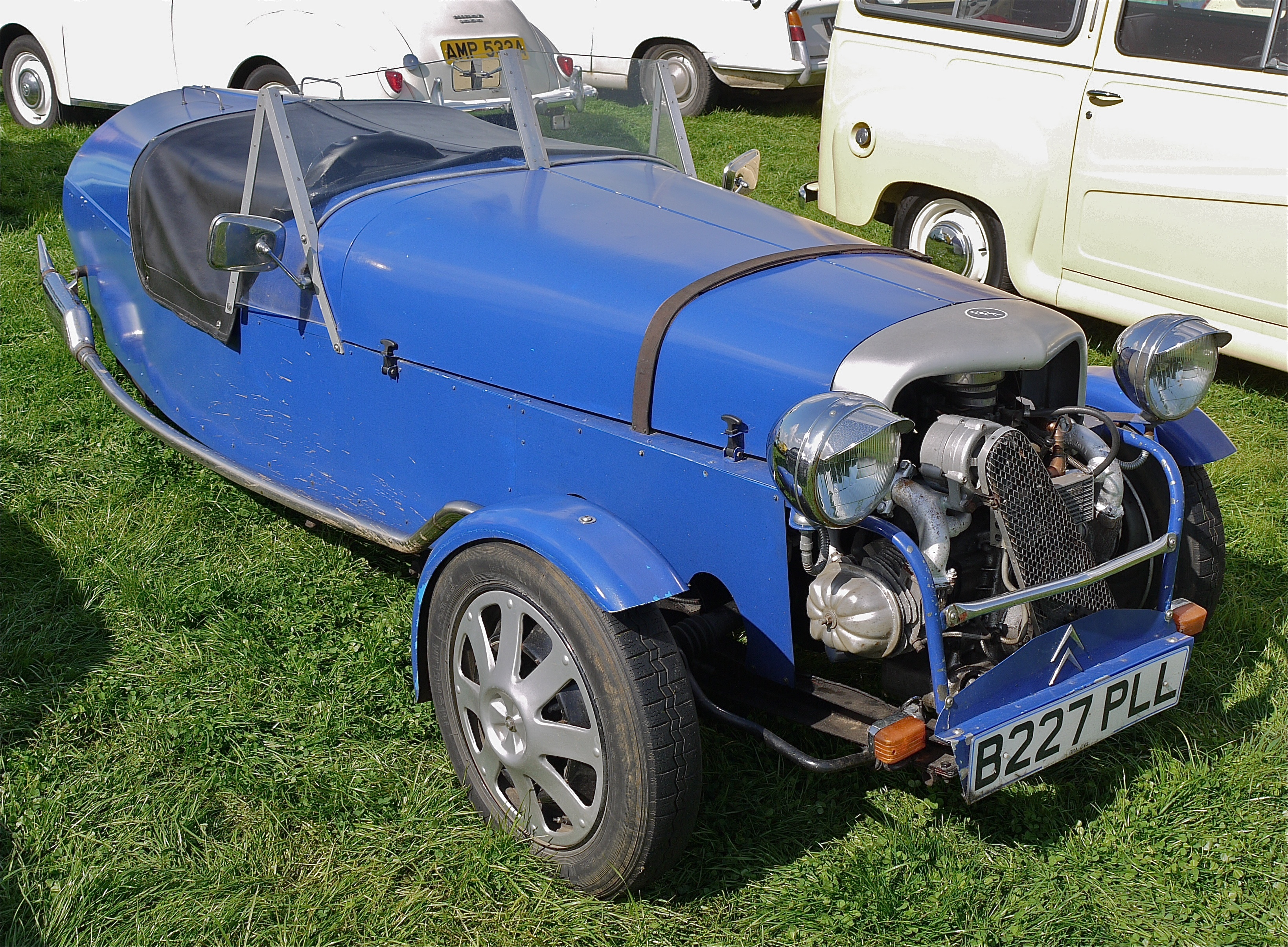 Panasonic G1 14-45 Lens